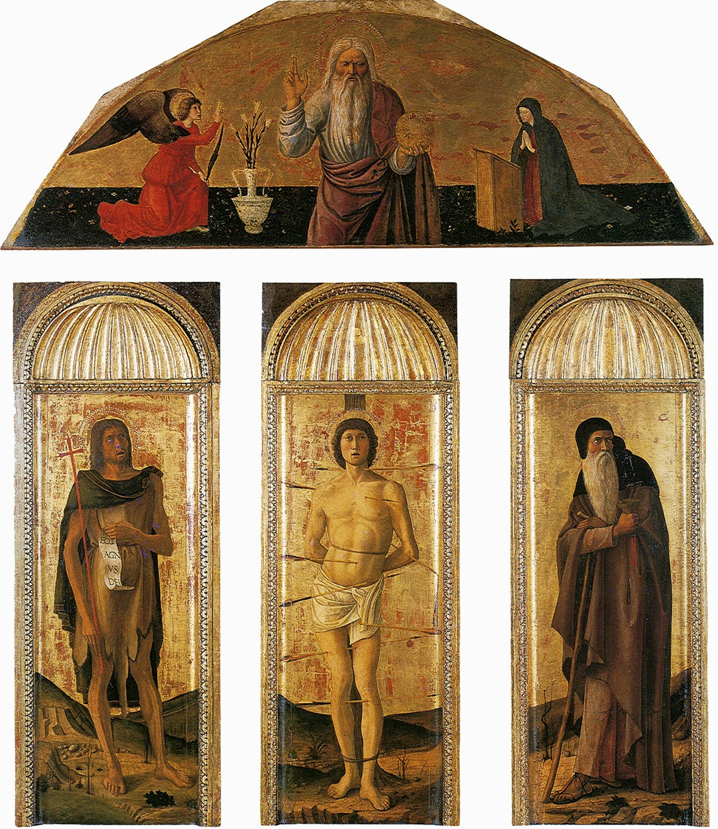 Triptych trittico di San Sebastiano